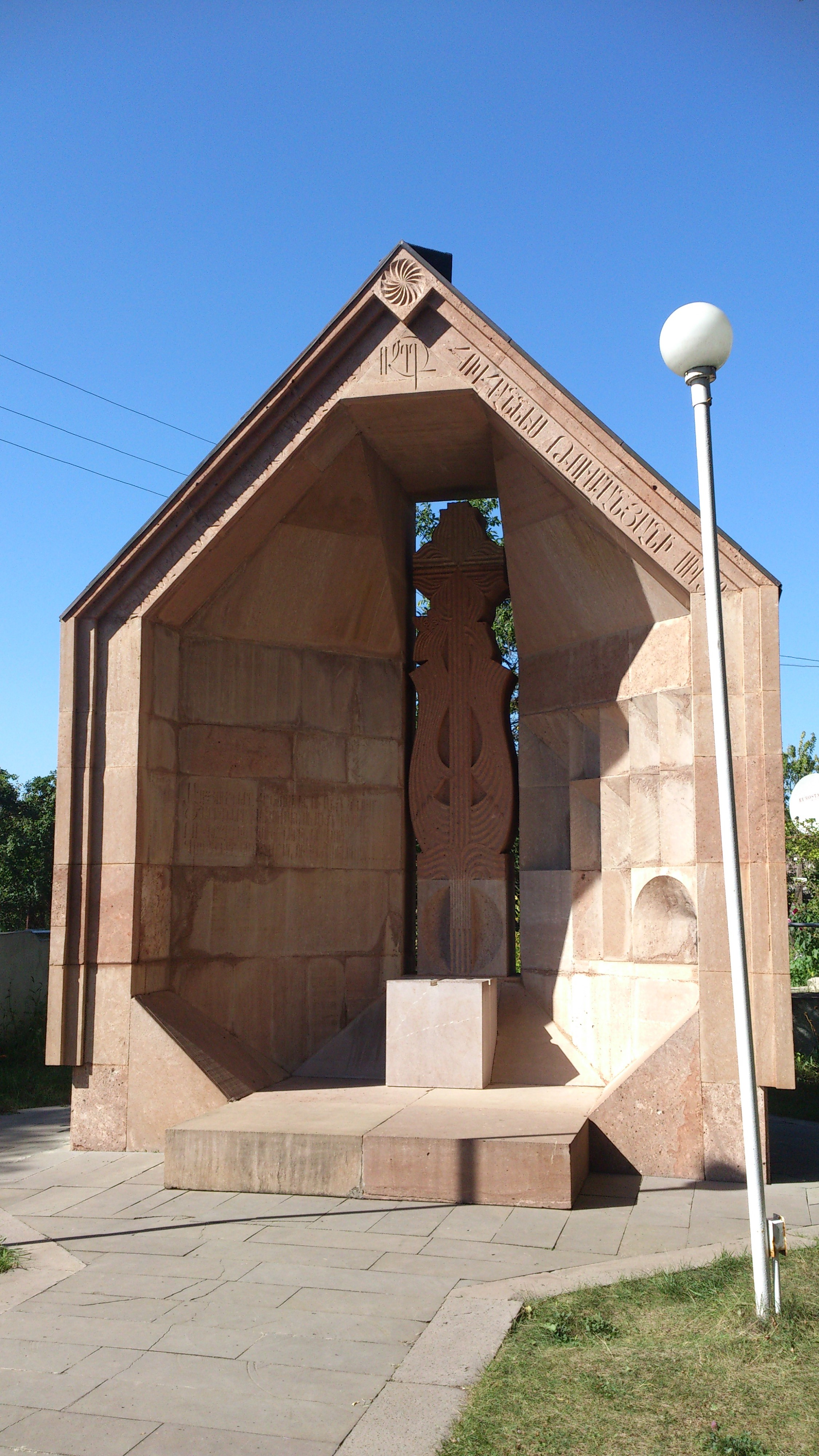 Տուն-թանգարան Հովհաննես Թումանյանի, 1939 թ., Թումանյանի սիրտը 35/41